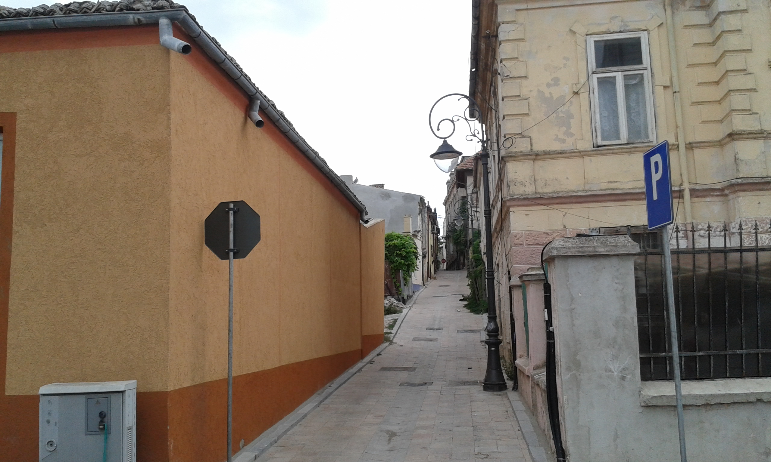 Intrarea pe Stradela Vantului dinspre Strada Marcus Aurelius